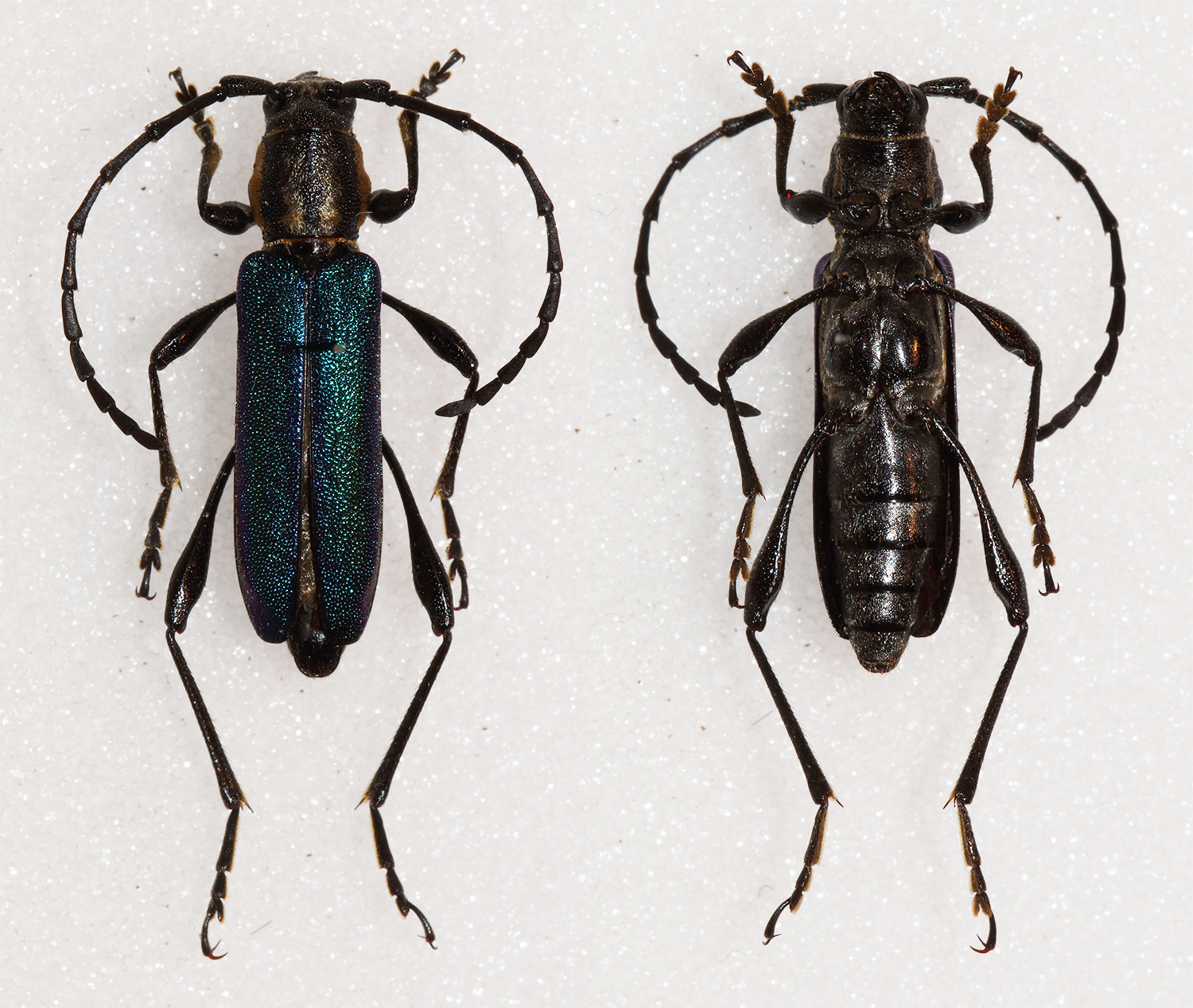 Gahan,1890 Sex: ? Data: 29-07-11 - Morogoro - Makambako - Njombe District - Iringa region - Tanzania Size: 15mm